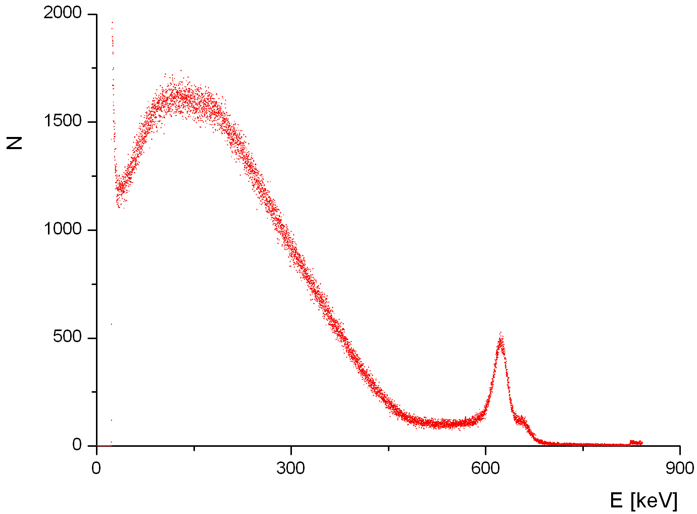 Betaspektrum Cs137